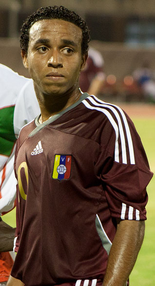 Yohandry Orozco en el Venezuela - Guinea